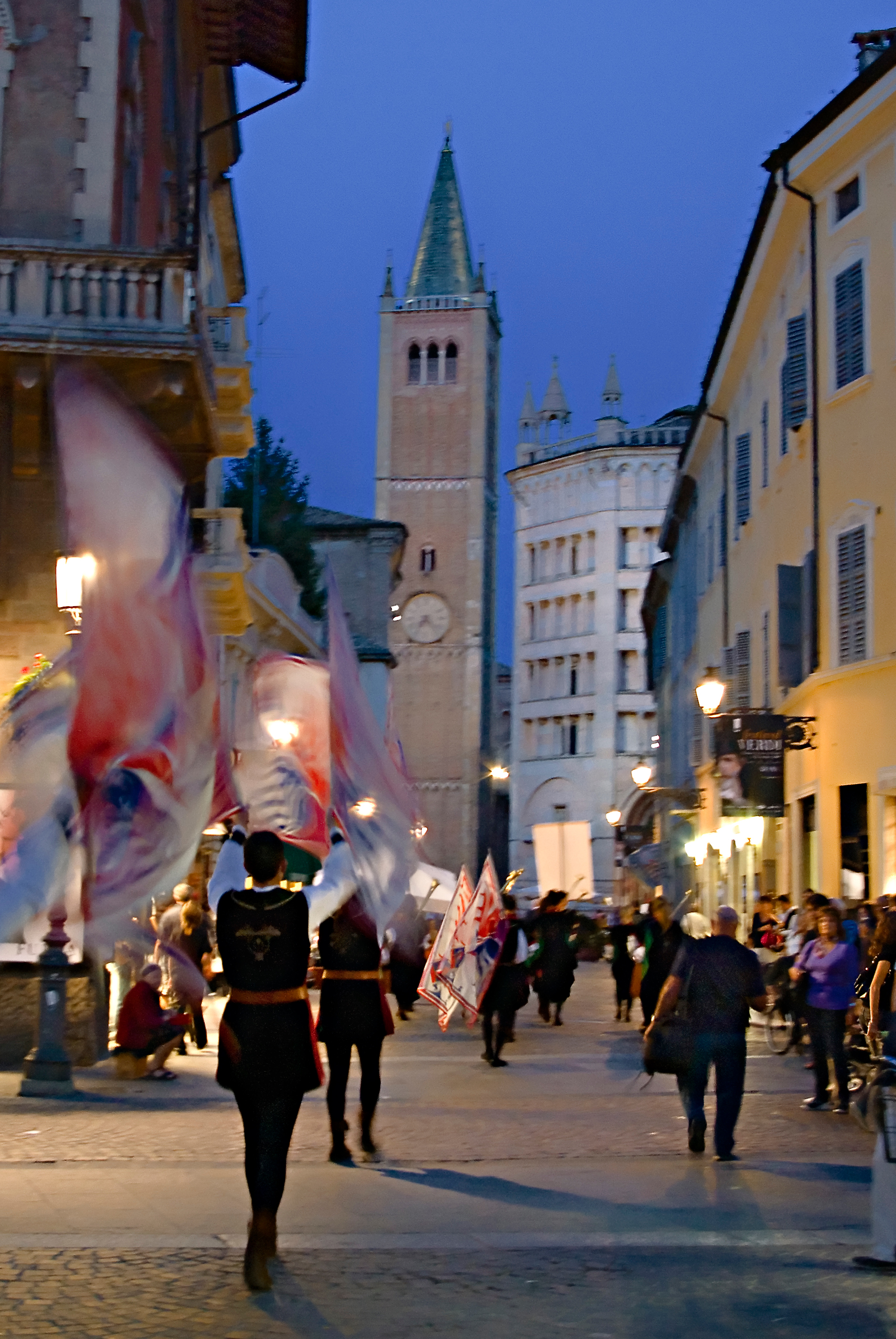 Palio di Parma - Strada al Duomo